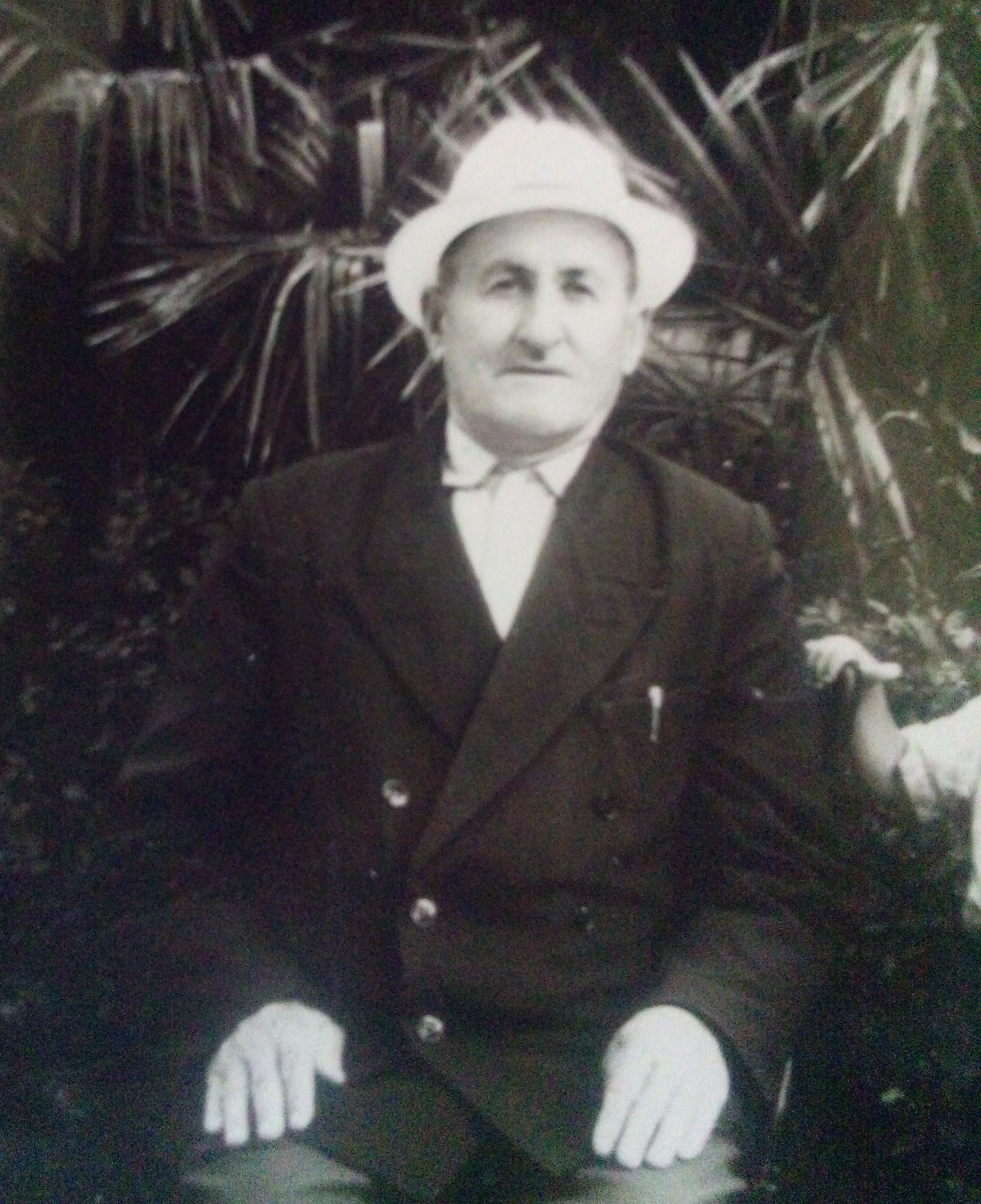 Ներքին Չարբախի հիմնադիր և առաջին ղեկավար